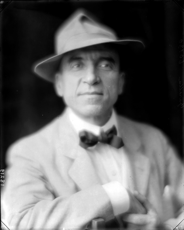 Antonio Garella